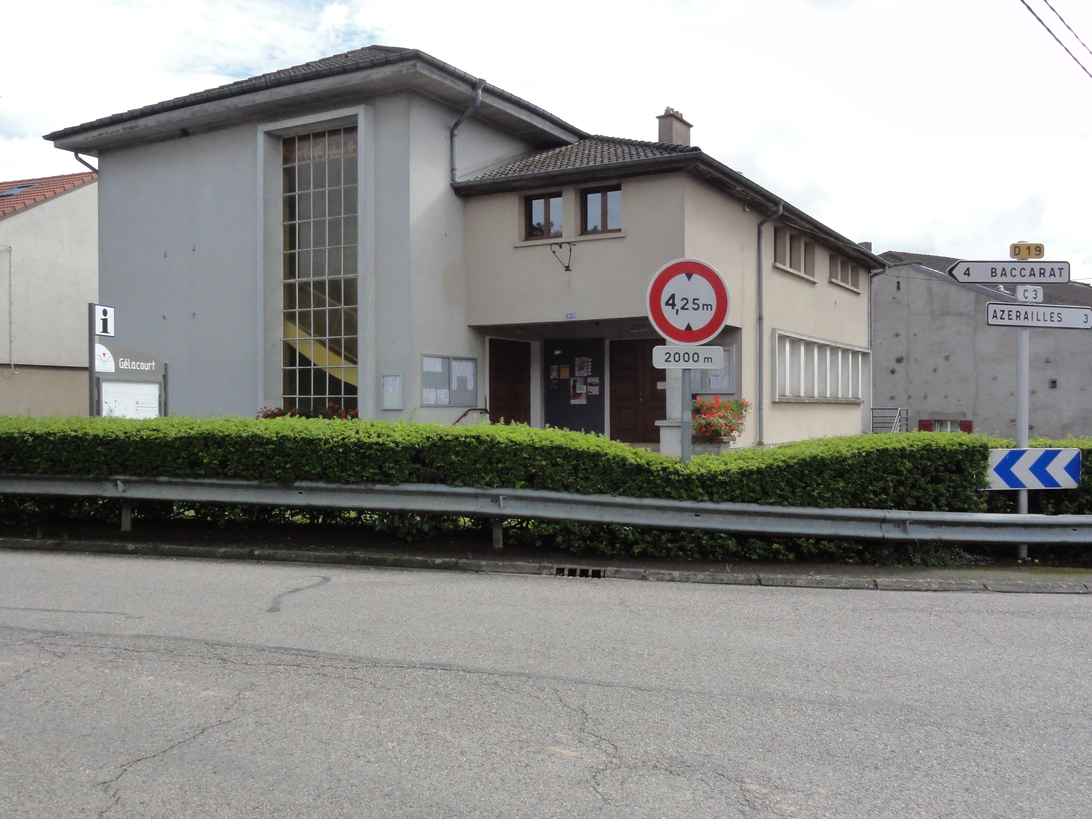 Gélacourt (M-et-M) mairie